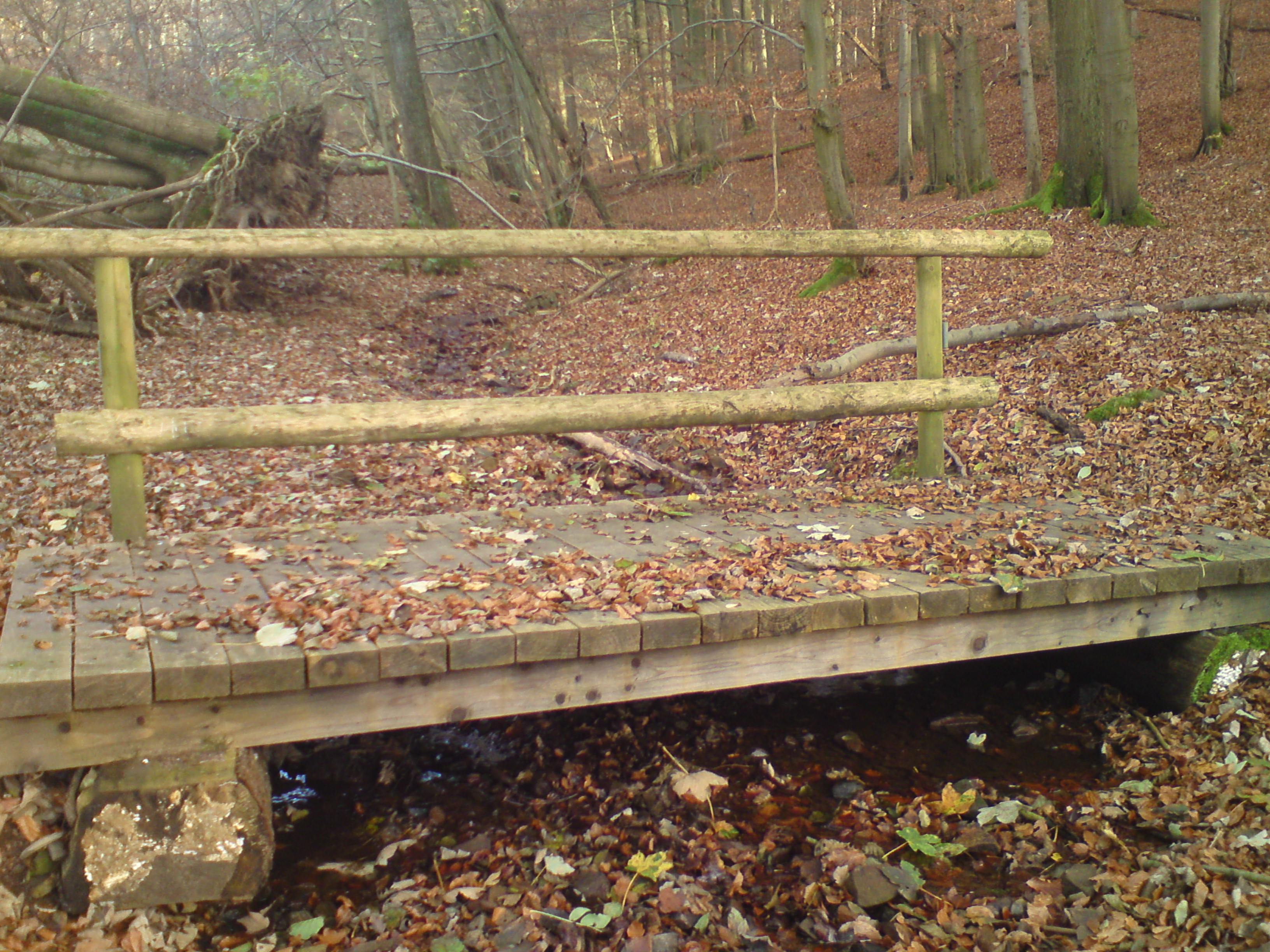 Der Faulbornbach im Bärenwinkel im Verlauf des Karstwanderwegs